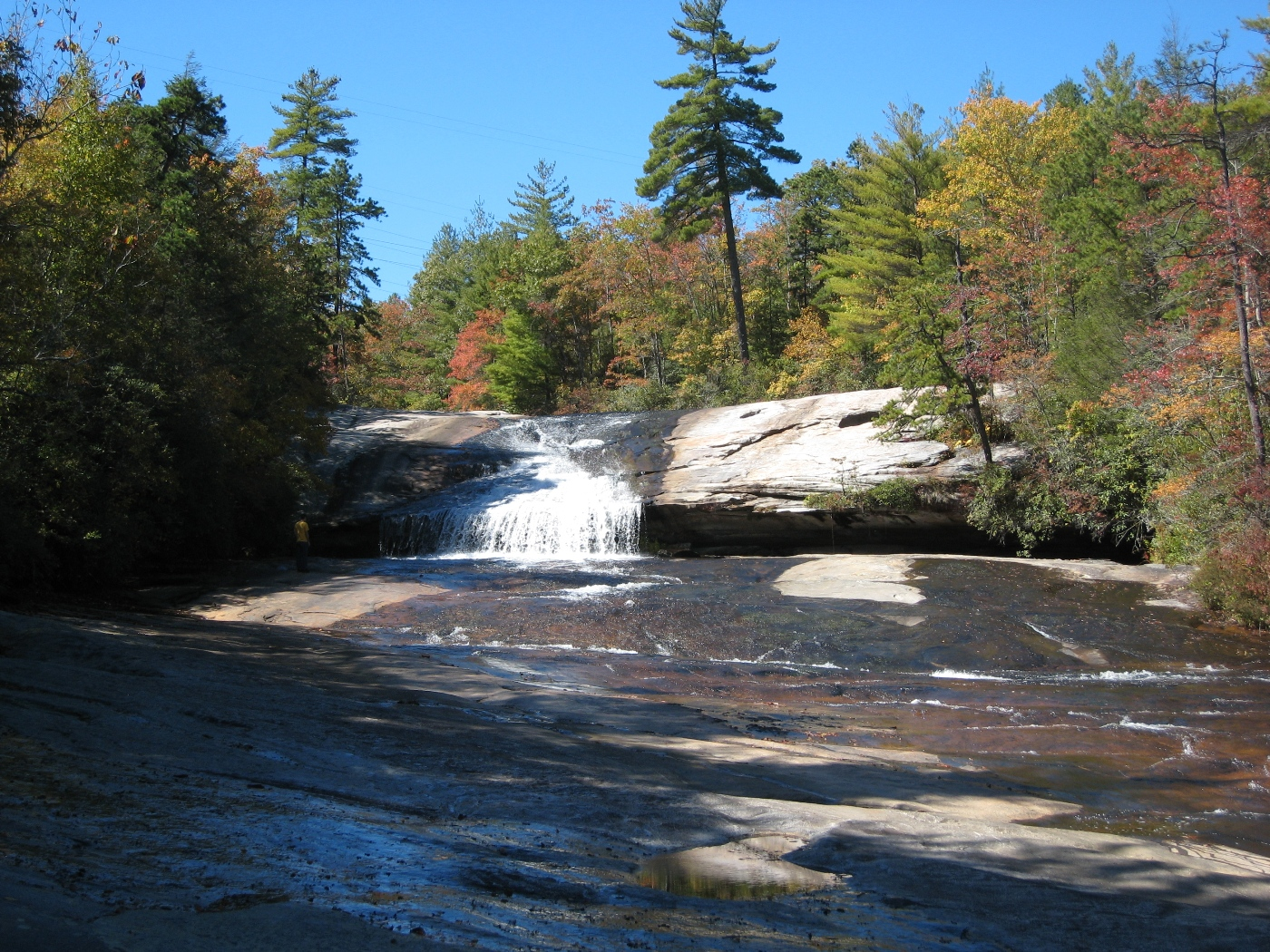 Upper Bridal Veil Falls